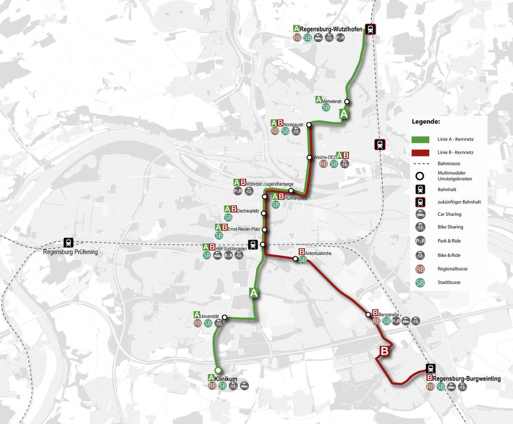 Erarbeiteter Liniennetzplan von Komobile